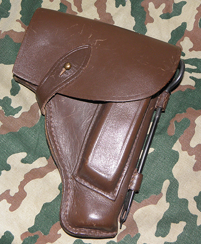 Штатная кобура для ПМ + шомпол-протирка-отвёртка